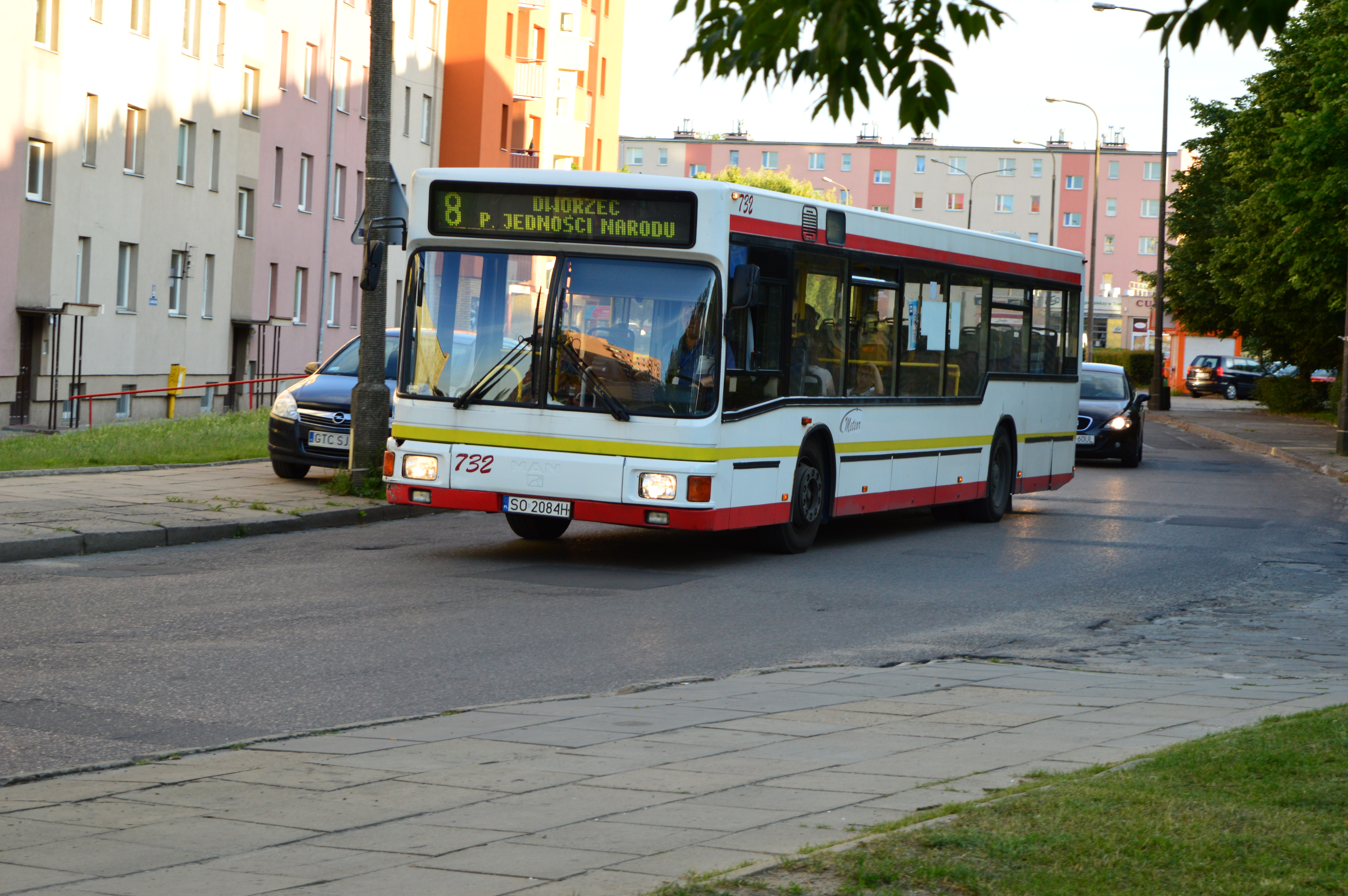 Autobus miejski MAN NL-202 firmy Meteor Jaworzno w mieście Tczew